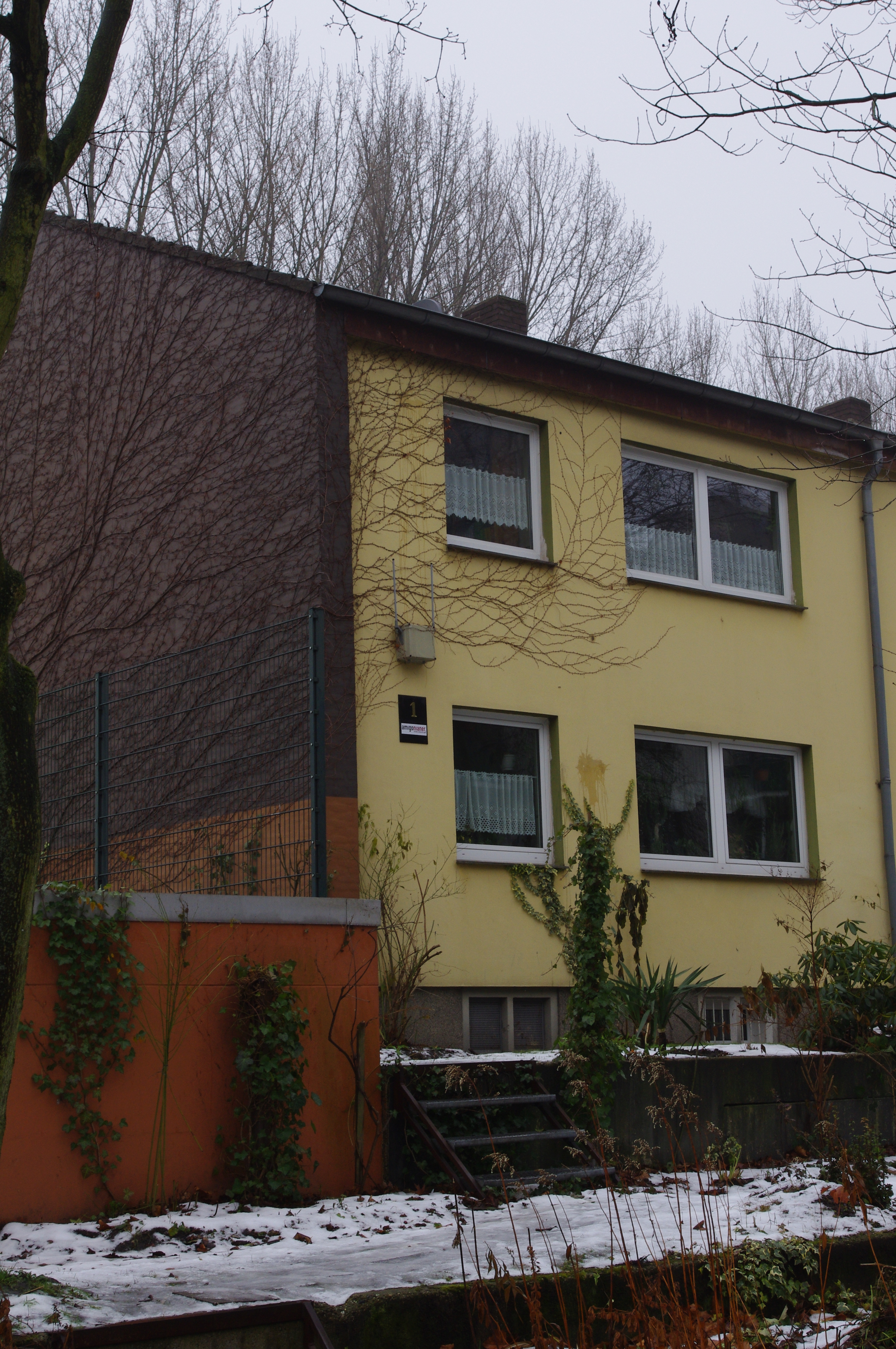 Kommunität der Amigonianer (offiziell: „Kapuziner Terziaren Unserer Frau der Schmerzen“ (lat.: Fratres Tertii Ordinis Sancti Francisci Capulatorum a Beata Virgine Perdolente, Ordenskürzel: TC)) in Gelsenkirchen-Feldmark